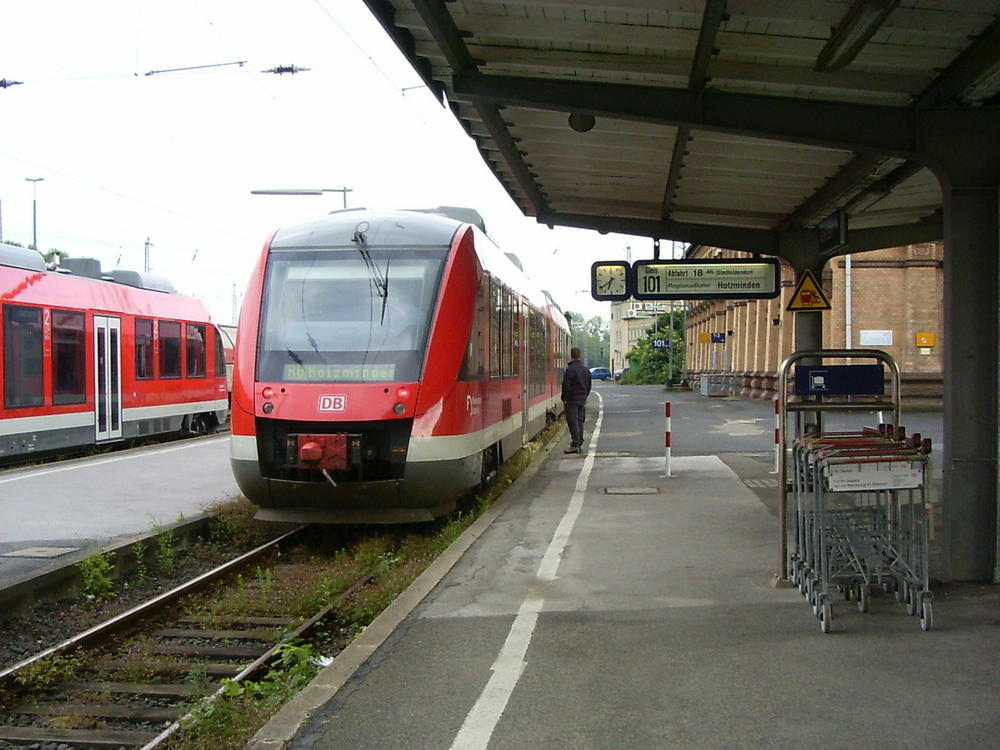 Bahnhof Kreiensen, Zug nach Holzminden